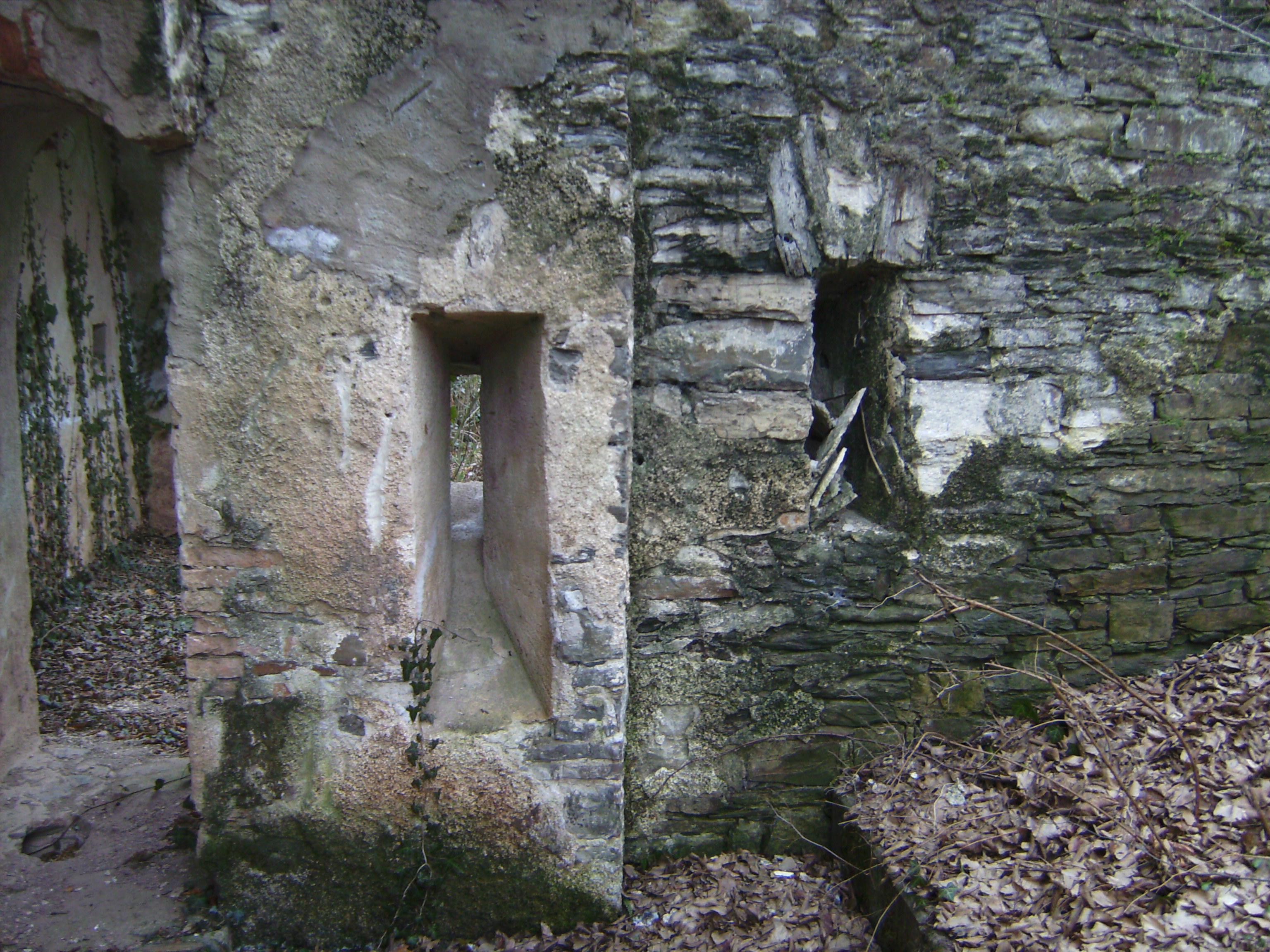 Moselflesche in Koblenz. Flusseitige Flankenmauer innen. Grabenstreiche nach Osten